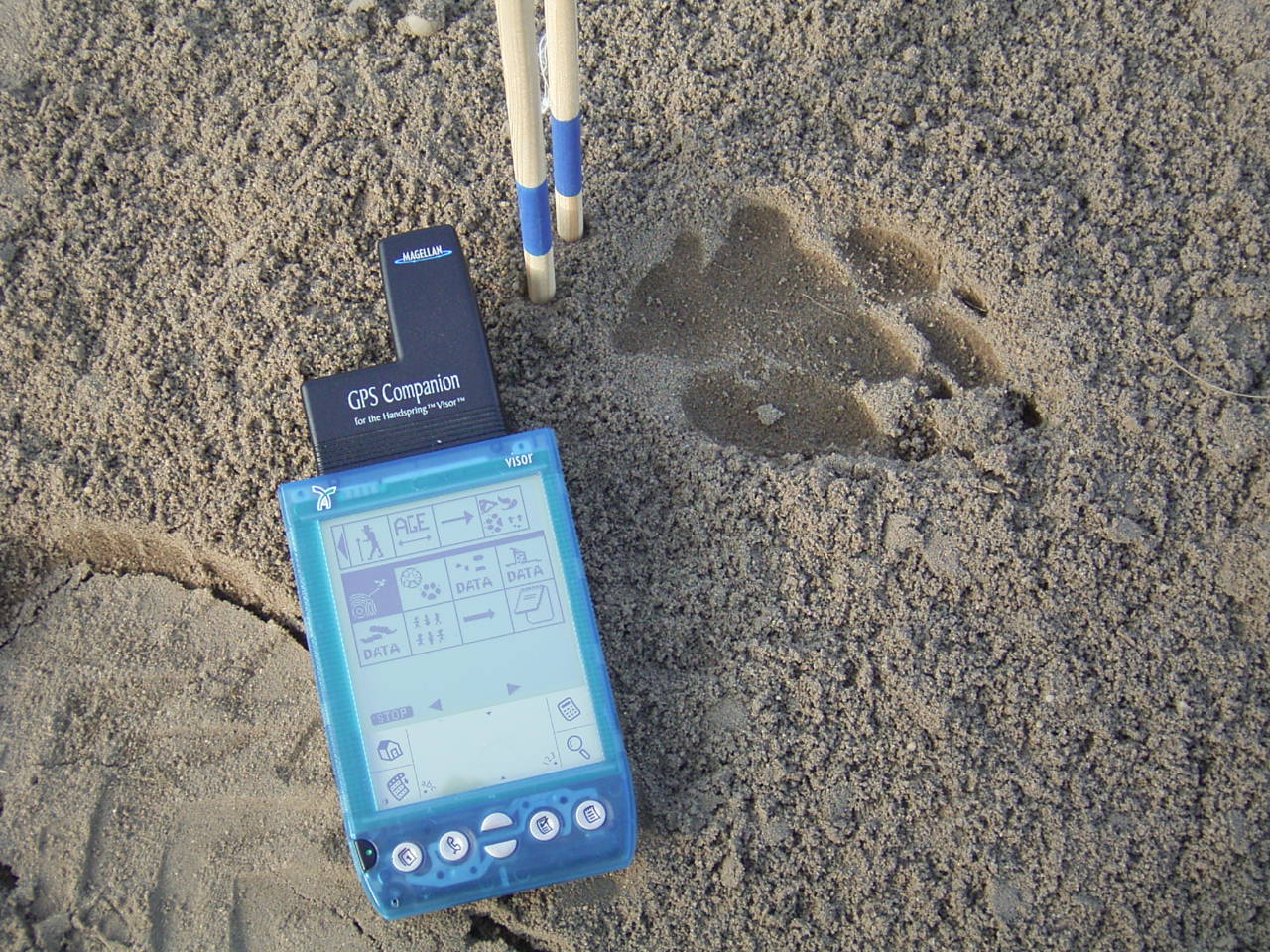 Cybertracker im Einsatz bei der Ausbildung von Spurenlesern